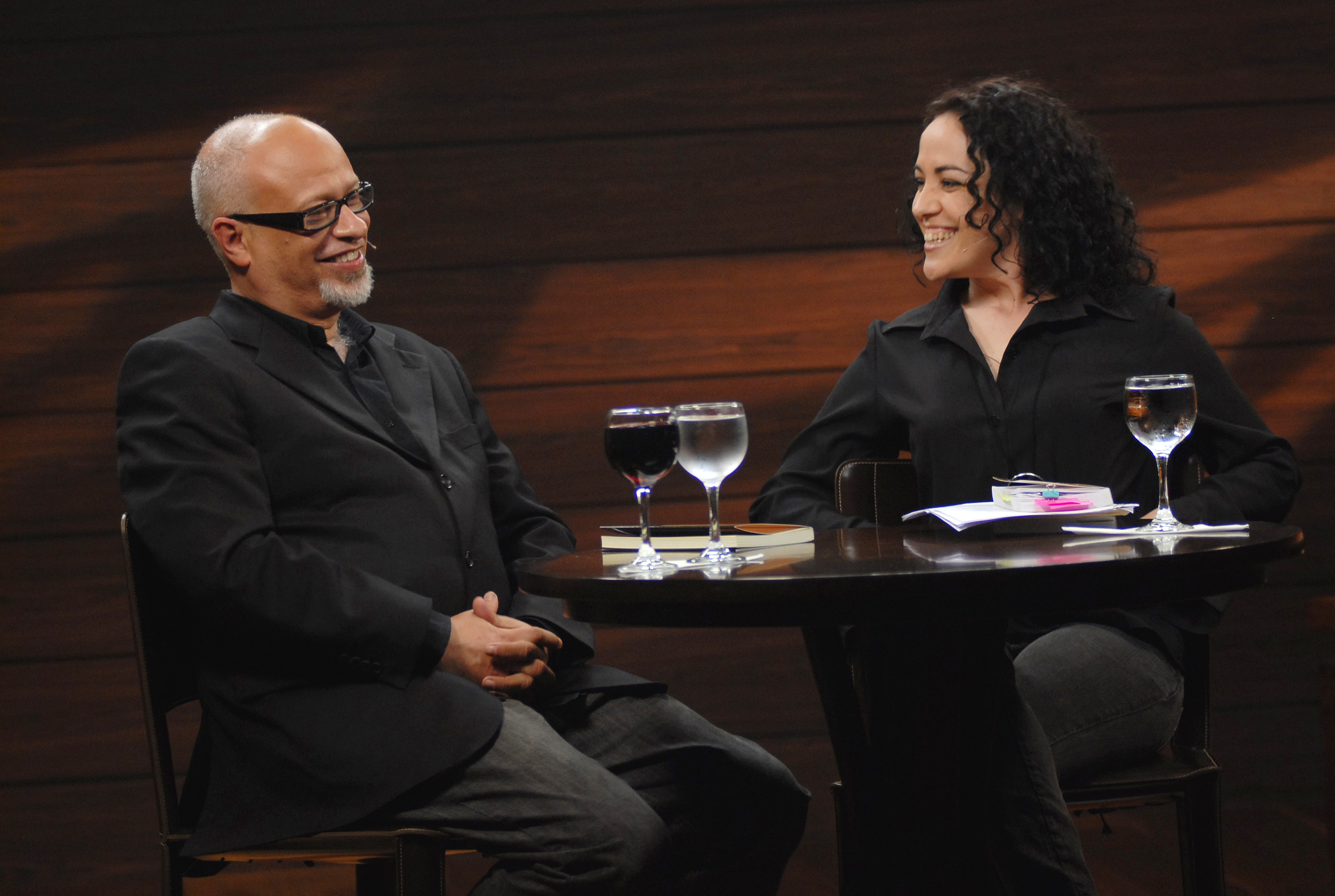 Especiais